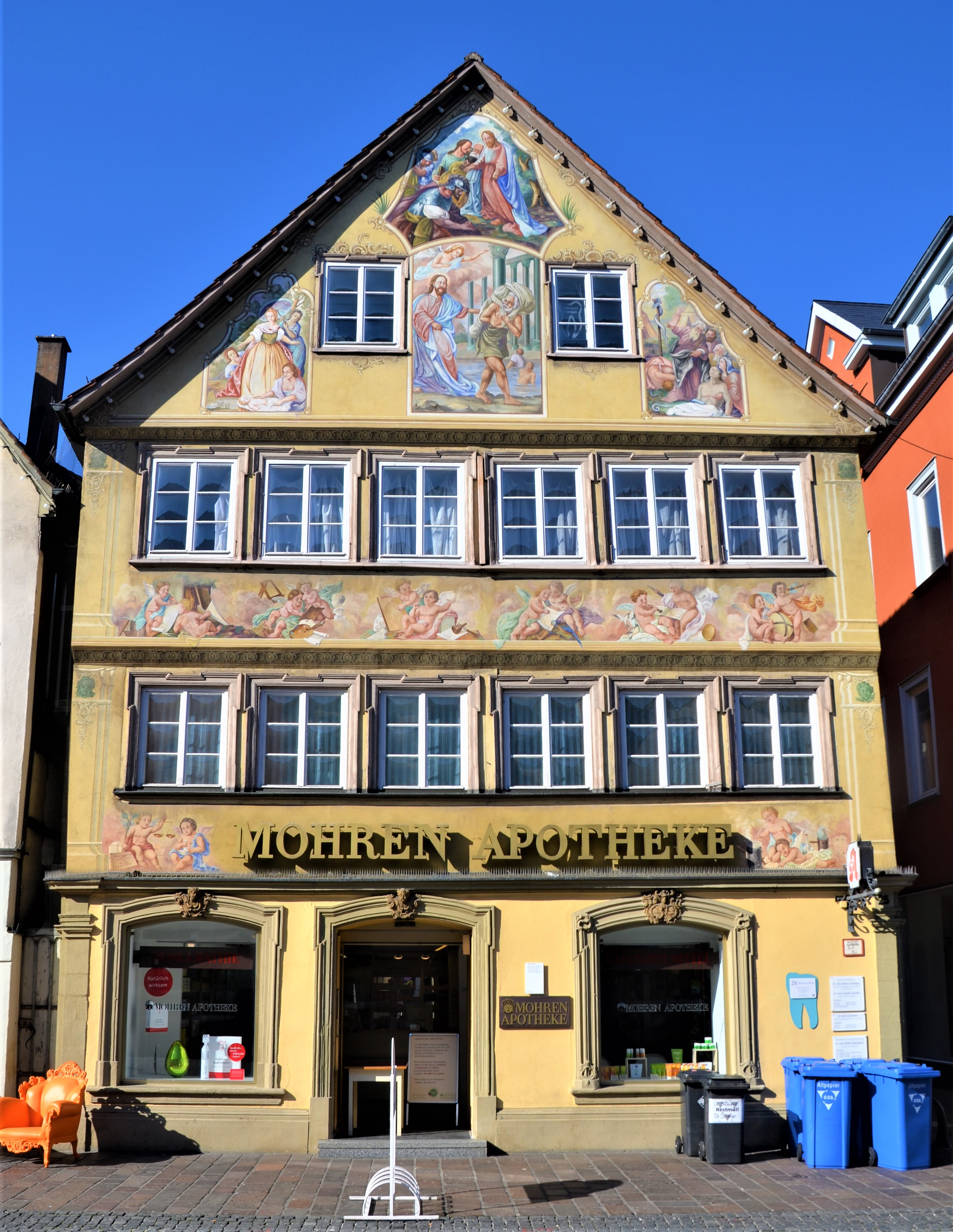 Mohrenapotheke mit der Joseph Wannenmacherbemalung am Marktplatz von Schwäbisch Gmünd